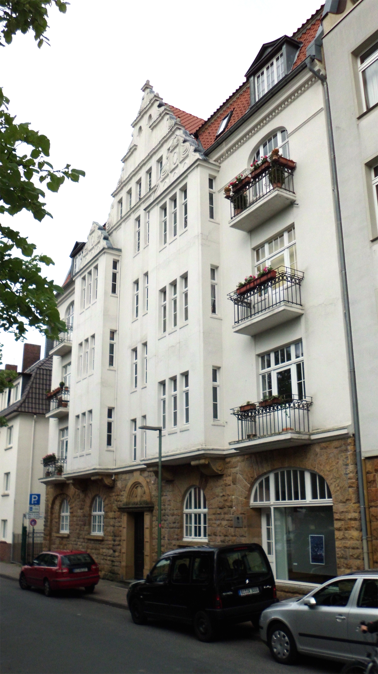 Bielefeld, Denkmalnummer 40, viergeschossiges Mietshaus von 1912/14